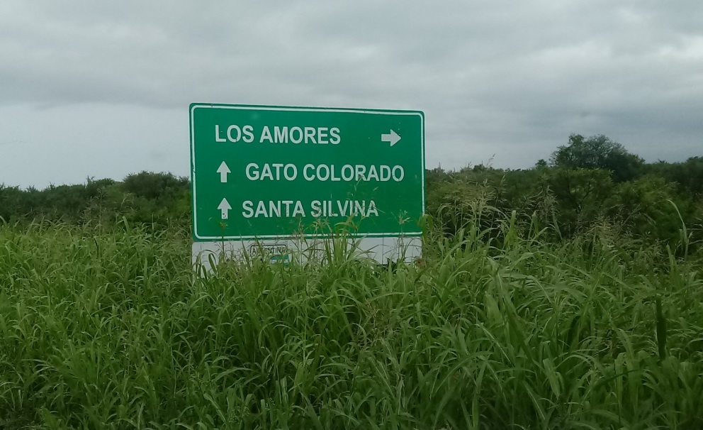 Señal de transito